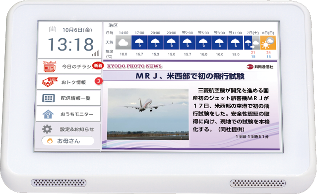 家庭内サイネージ T-STATION